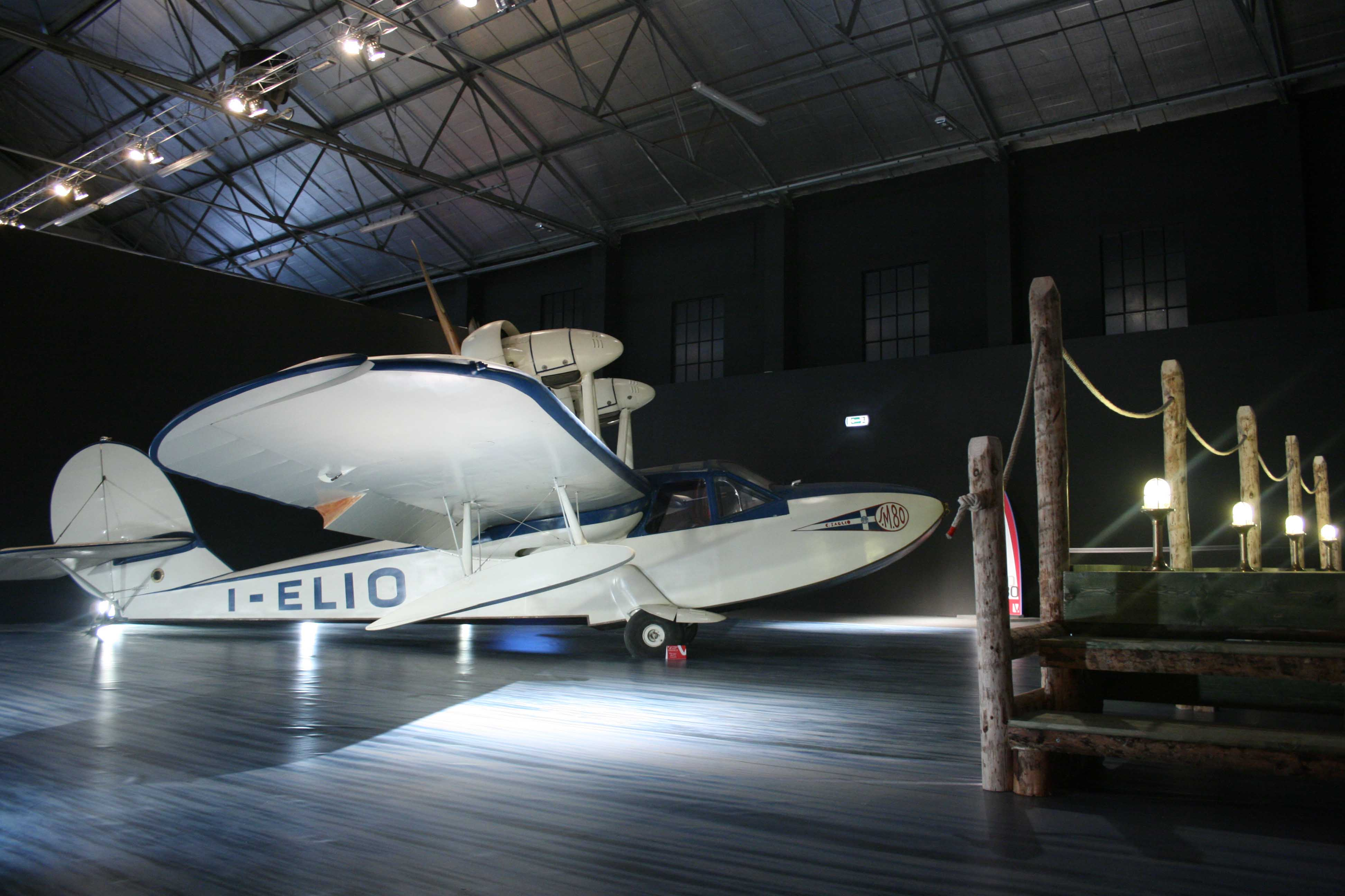 Savoia-Marchetti S.80 bis at Volandia, Vizzola Ticino, Varese, Italy